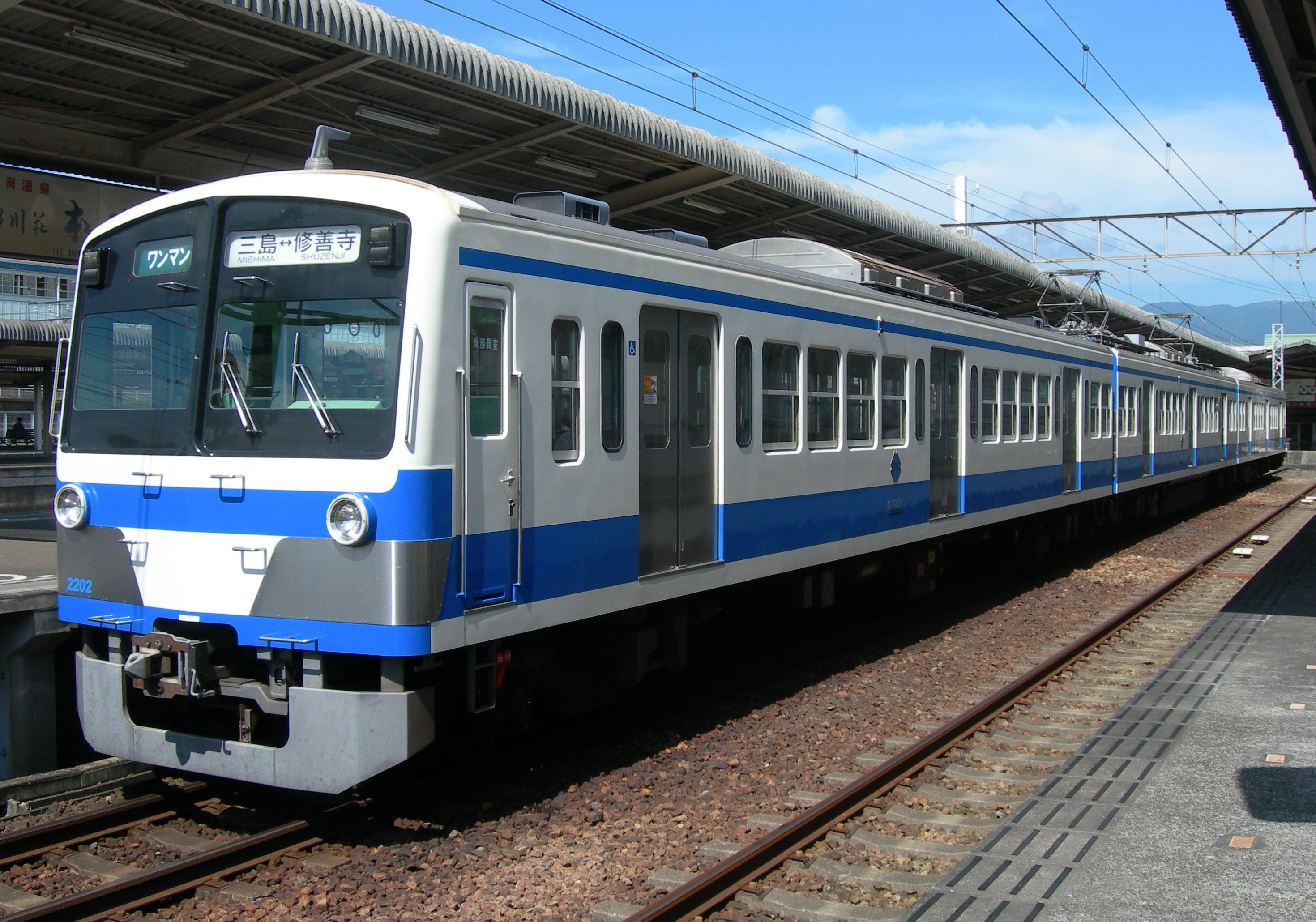 Ja:伊豆箱根鉄道1300系電車